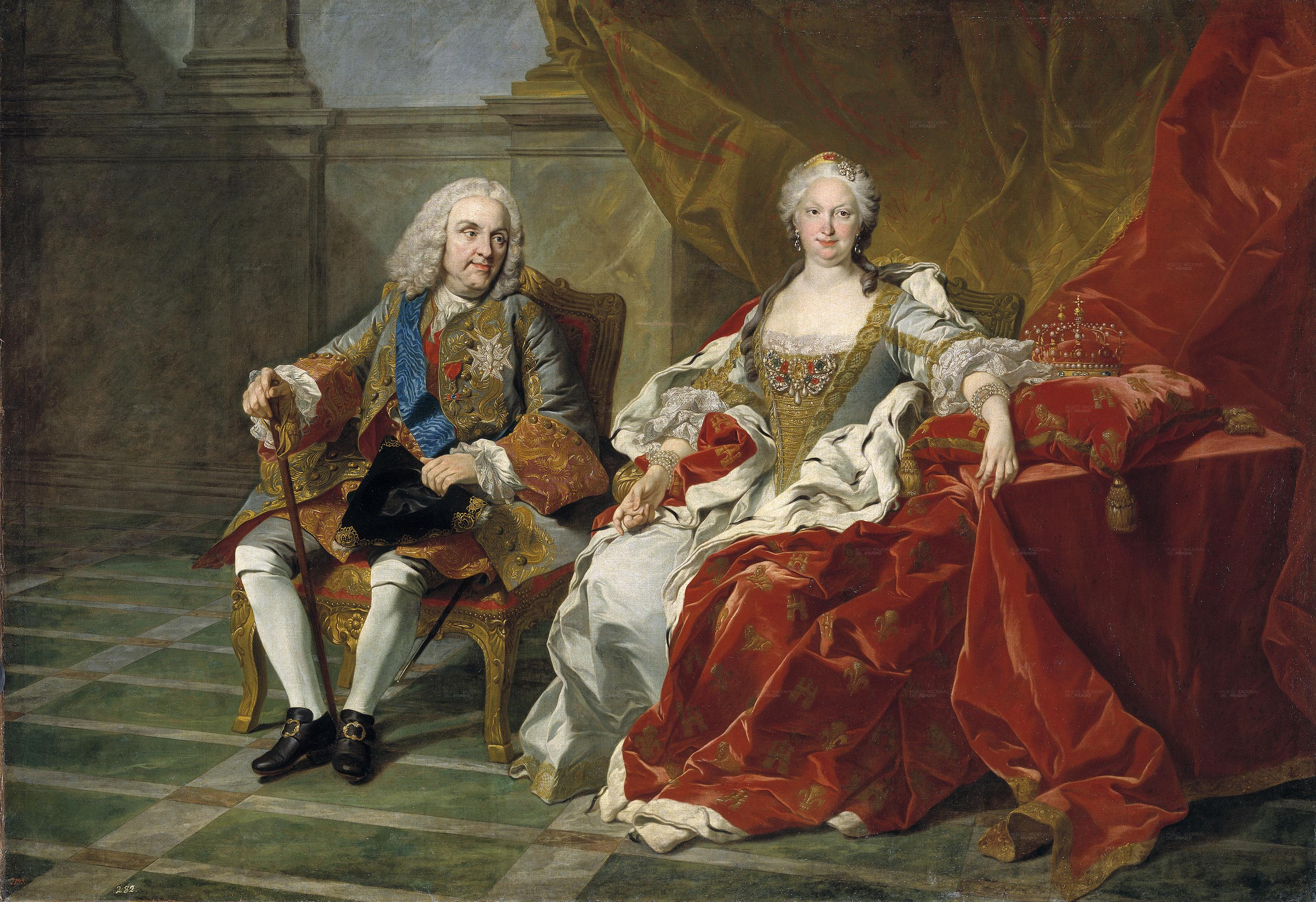 Retrato del rey Felipe V de España (1683-1746) y de su segunda esposa, la reina Isabel de Farnesio (1692-1766).